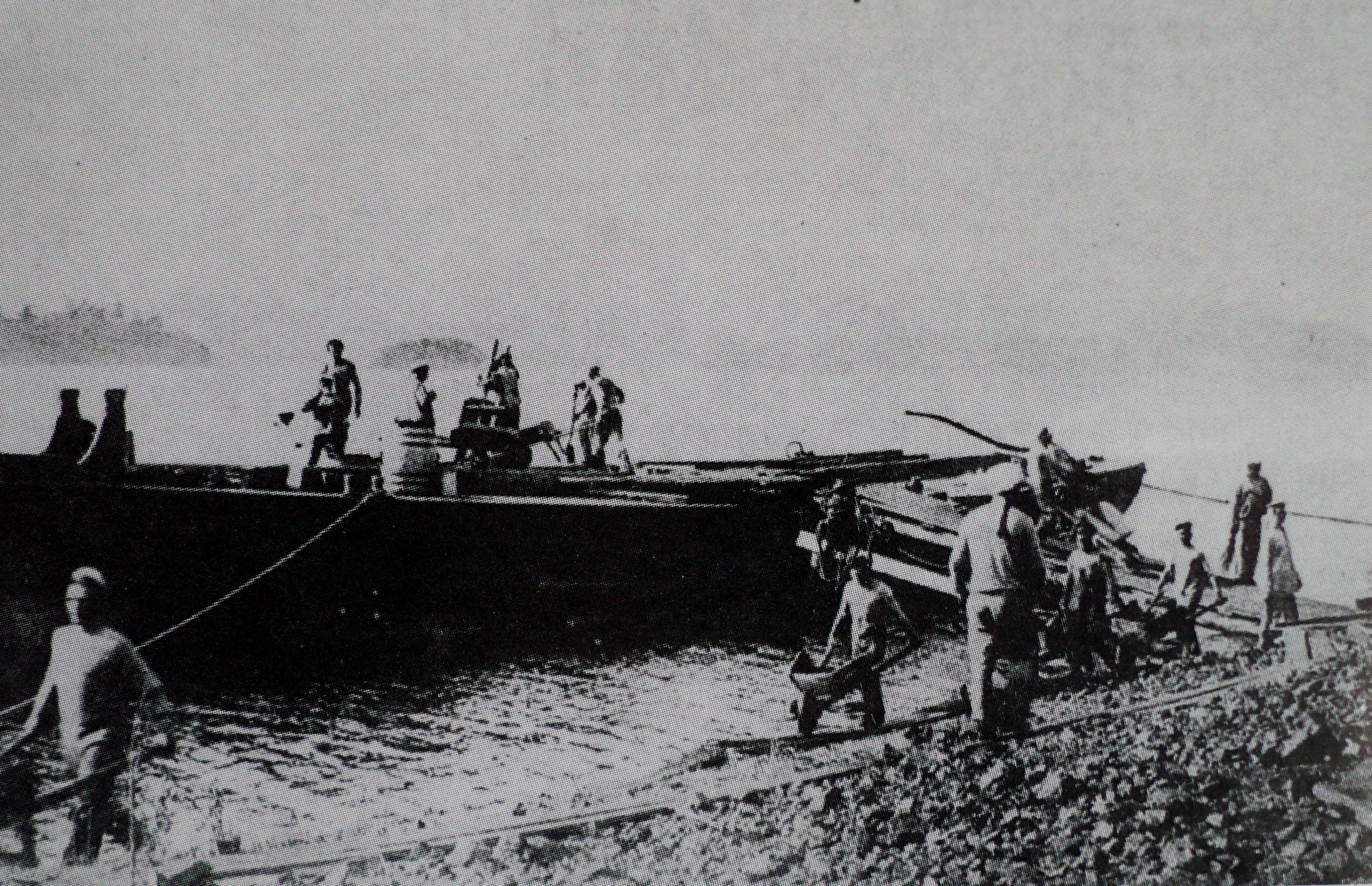 Погрузка угля в Находке командой крейсера «Адмирал Корнилов». Июнь 1893 года.